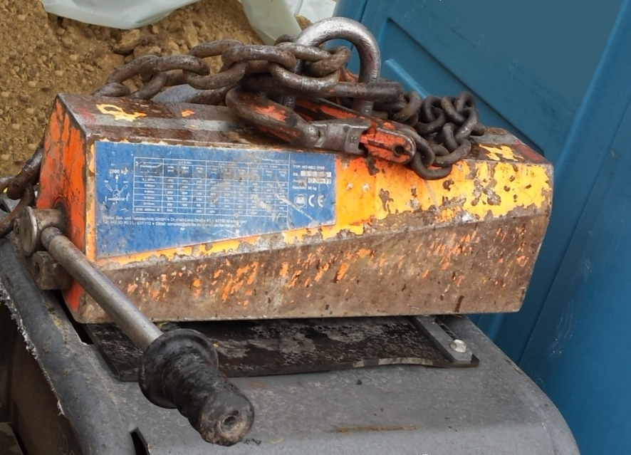 Lasthebemagnet an Baustelle